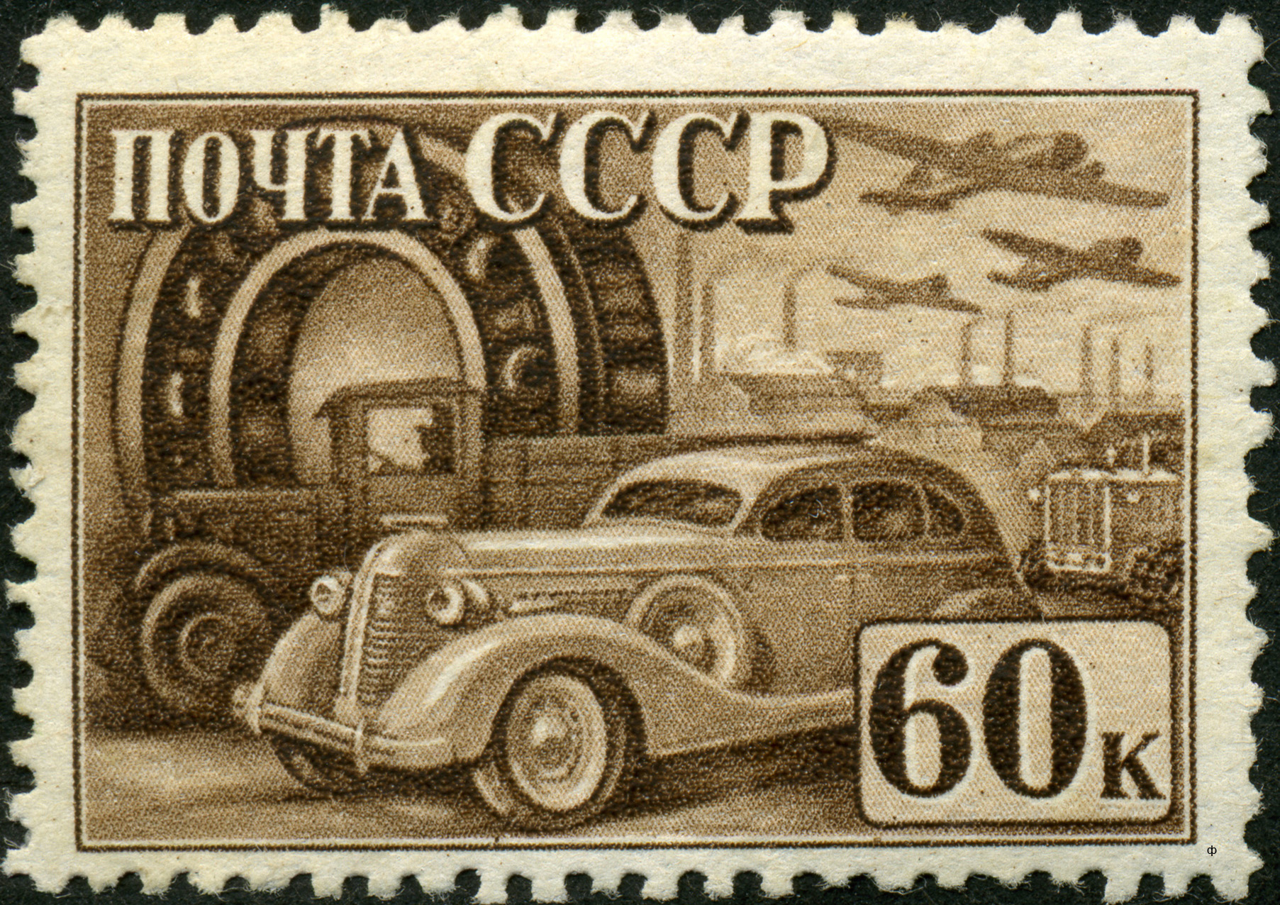 Почтовая марка СССР из серии «Индустриализация в СССР», выпущенная в январе 1941 года. На марке изображены автомобили и подшипник. Художник — Ф.Козлов. Номер по каталогу ЦФА — 785. Тираж — 2 млн.